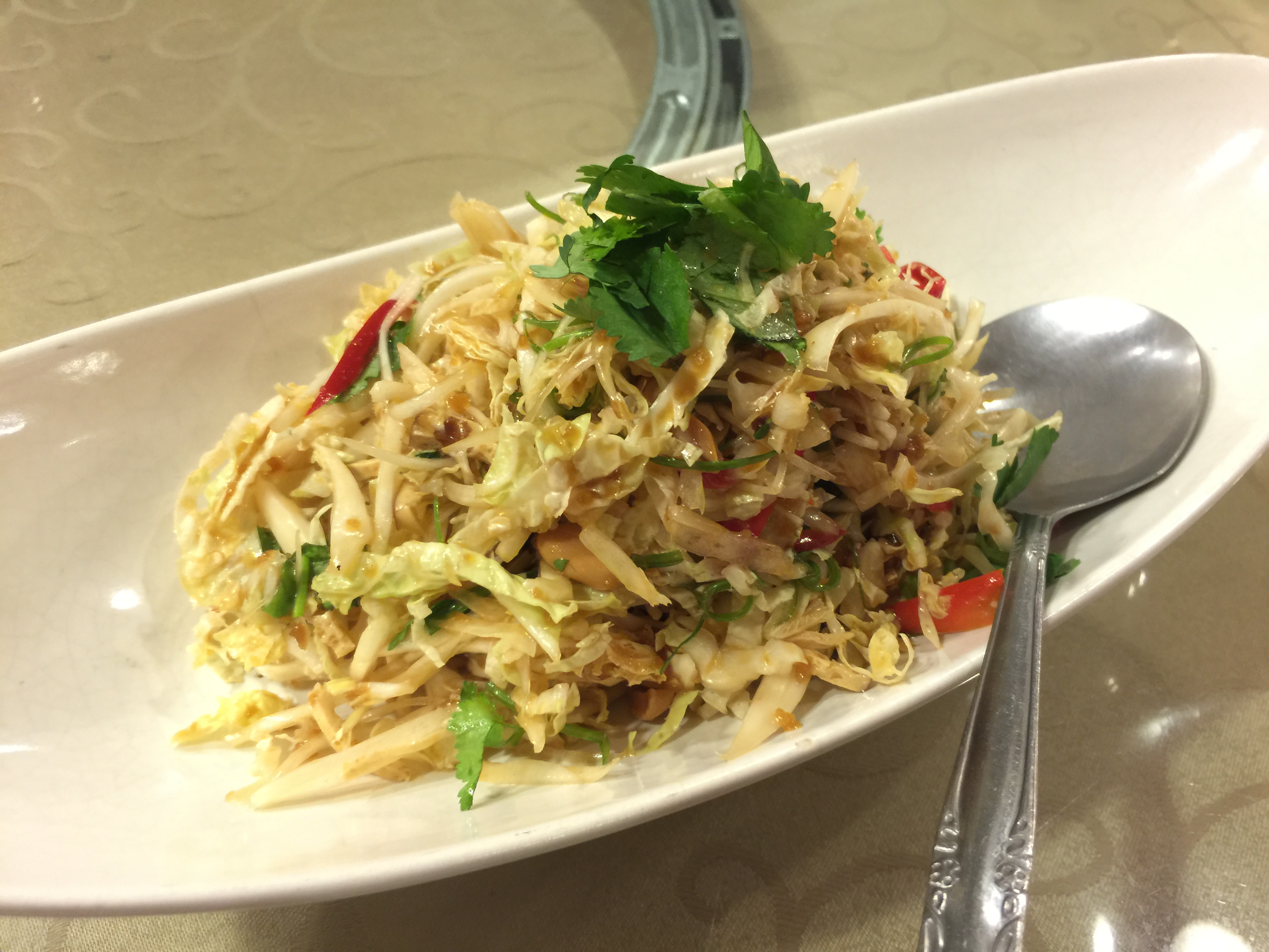 涼拌白菜心, 御鼎香脆皮烤鴨餐廳, 御鼎香, 台北